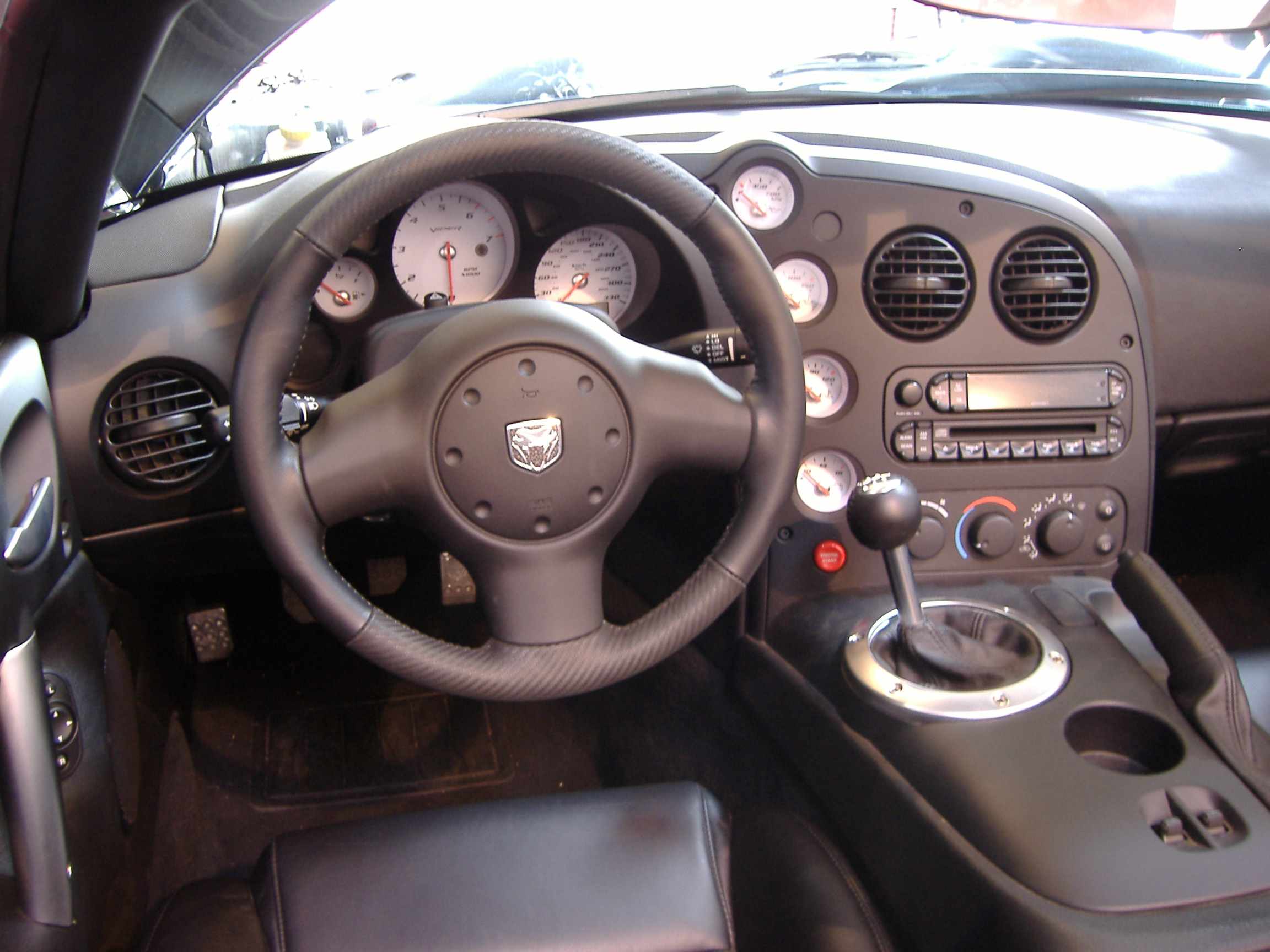 Cockpit einer Viper